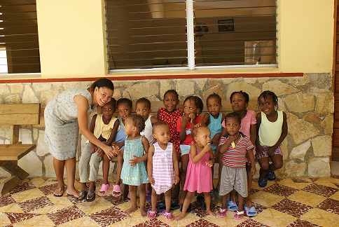 Haïtiaanse opvoesdster, samen met haar groep kleutertjes waarvoor ze verantwoordelijk is.